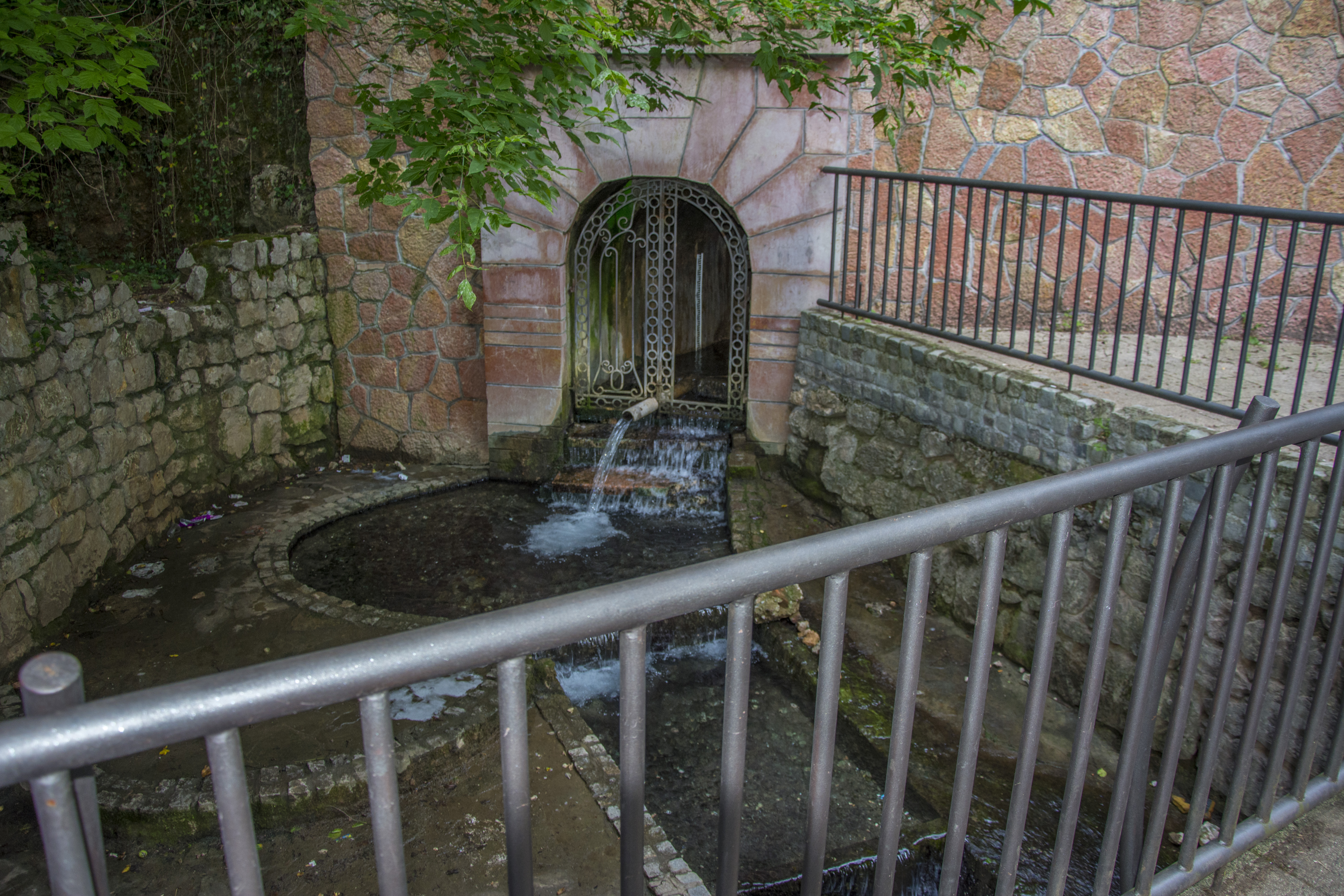 Niška banja Suva banja izvor